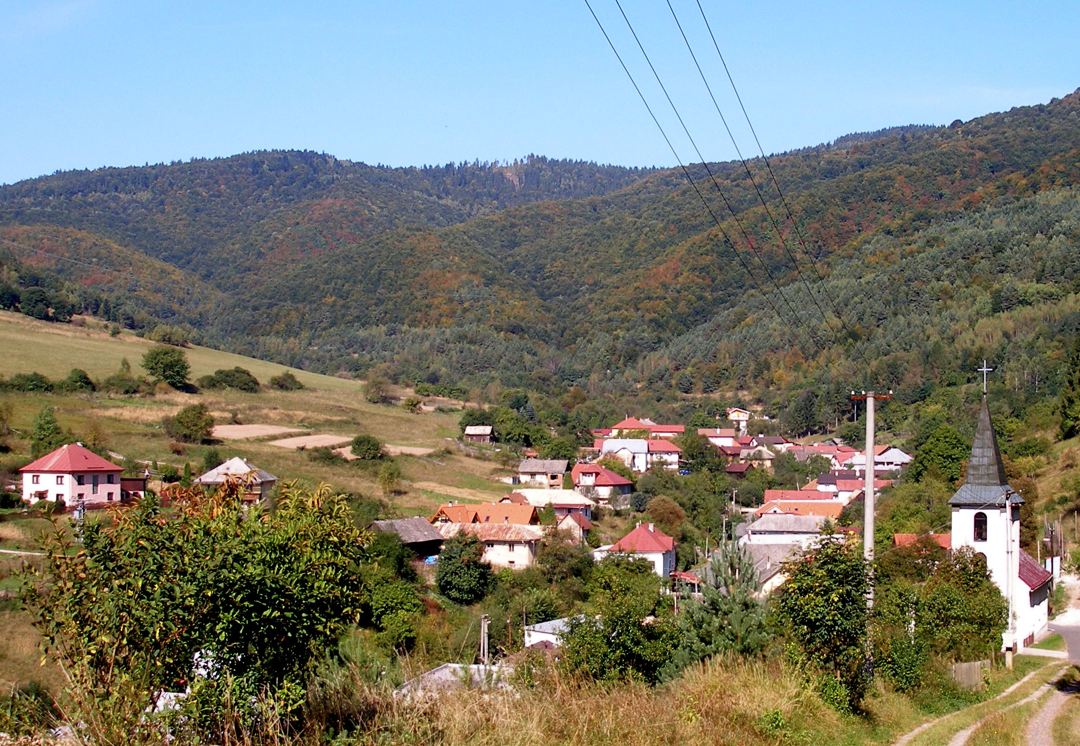 Spišská obec Hrišovce okres Gelnica.